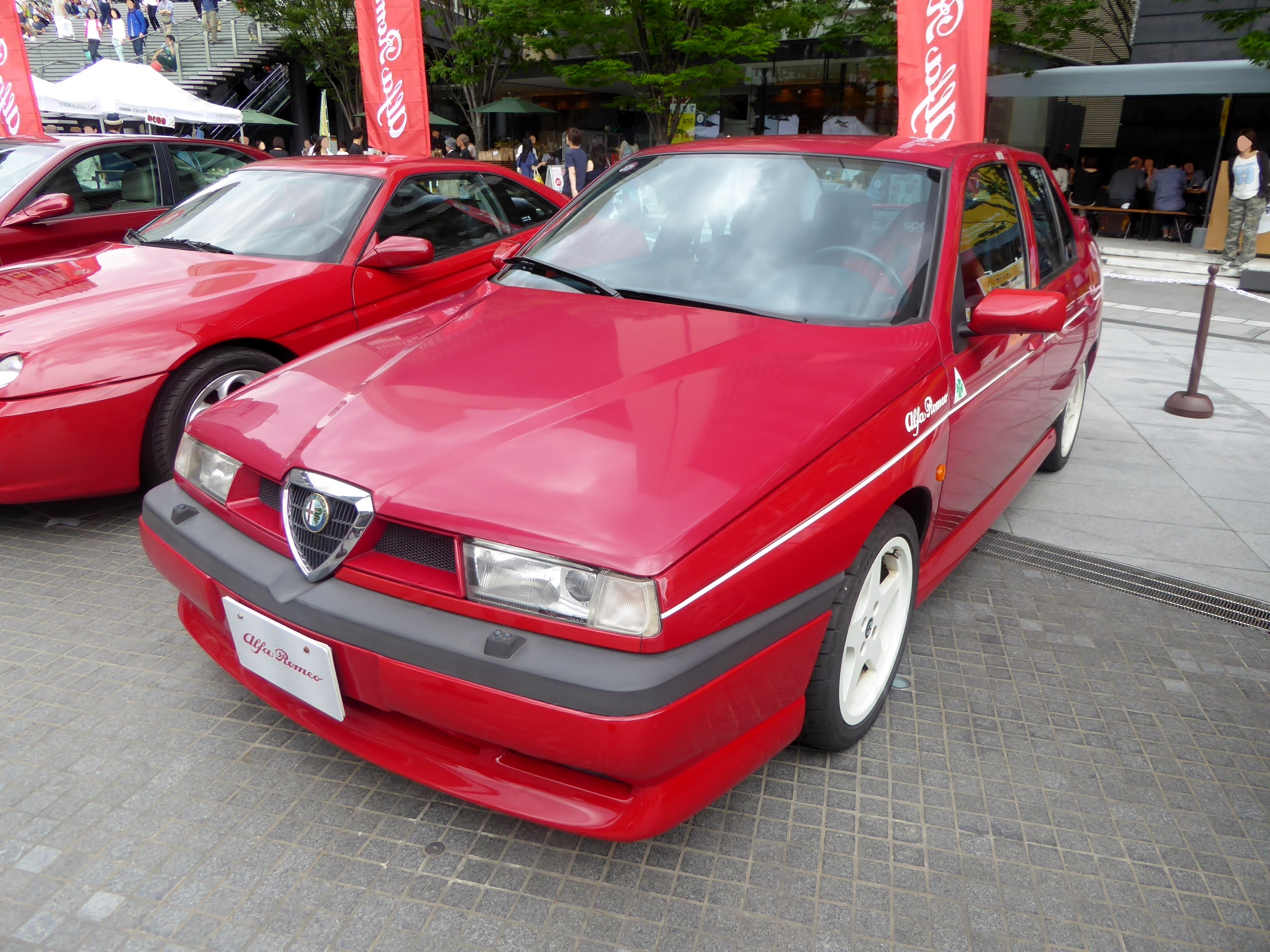 アルファロメオ・155 2.5V6をフロントから撮影。